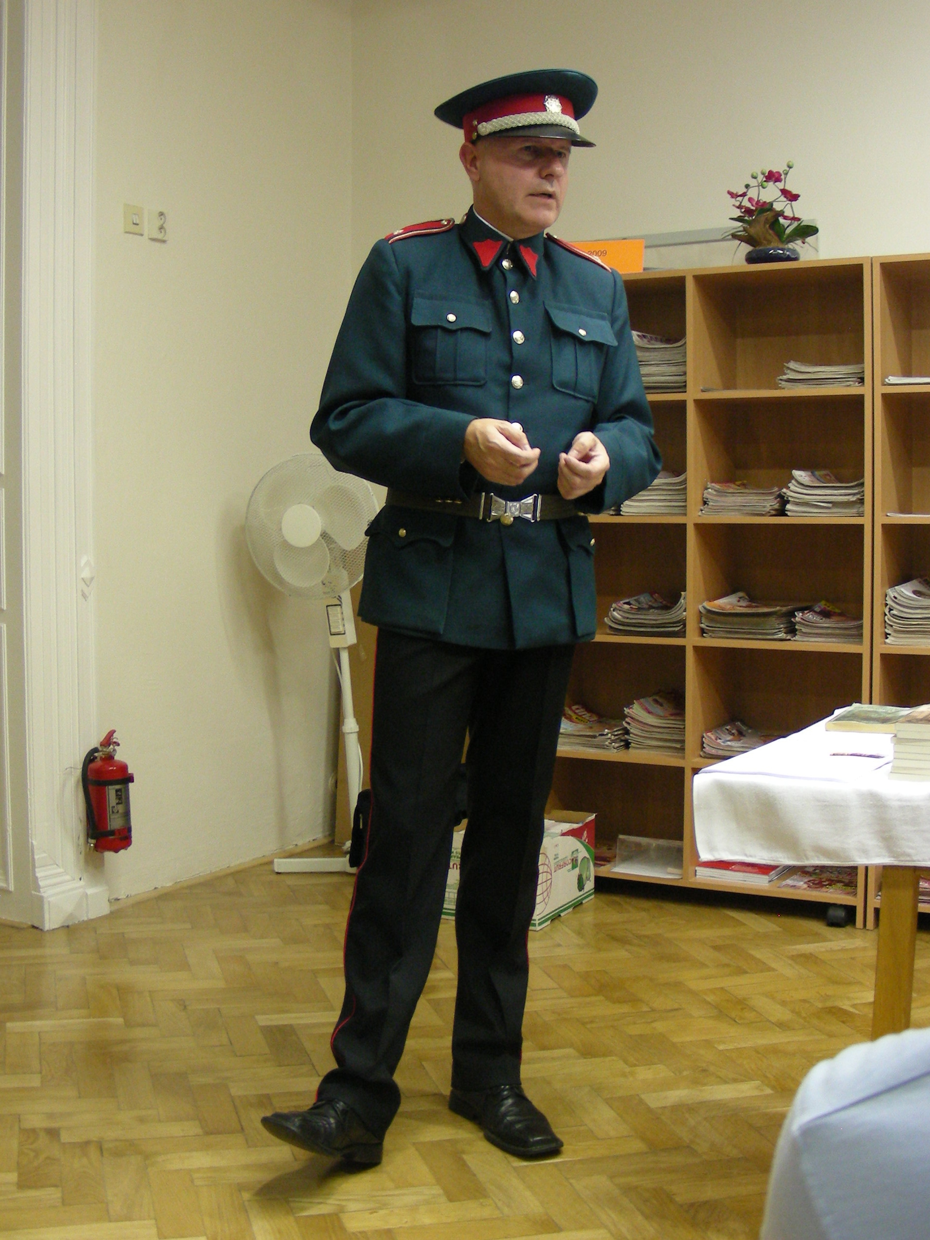 Plukovník JUDr. Michal Dlouhý, Ph.D. (* 4. listopadu 1962) je český právník, policista, historik a spisovatel, specializující se na historii českého četnictva a kriminalistiky. Je autorem řady odborných prací i populárně naučných knih z oblasti svého oboru a odborným konzultantem a spoluautorem předlohy k seriálu Četnické humoresky. V listopadu 2011 obdržel od občanského sdružení Asociace nositelů legionářských tradic cenu Český patriot za publicistickou a výchovně - vzdělávací činnost v oblasti české historie.